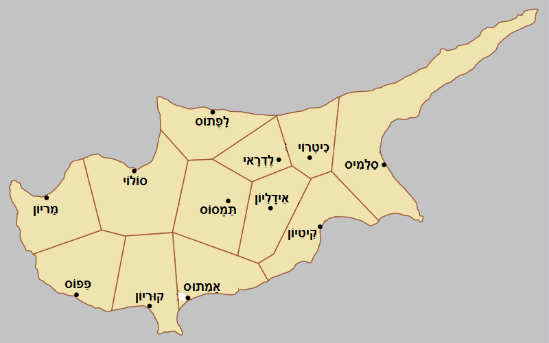 ערי הממלכות של קפריסין